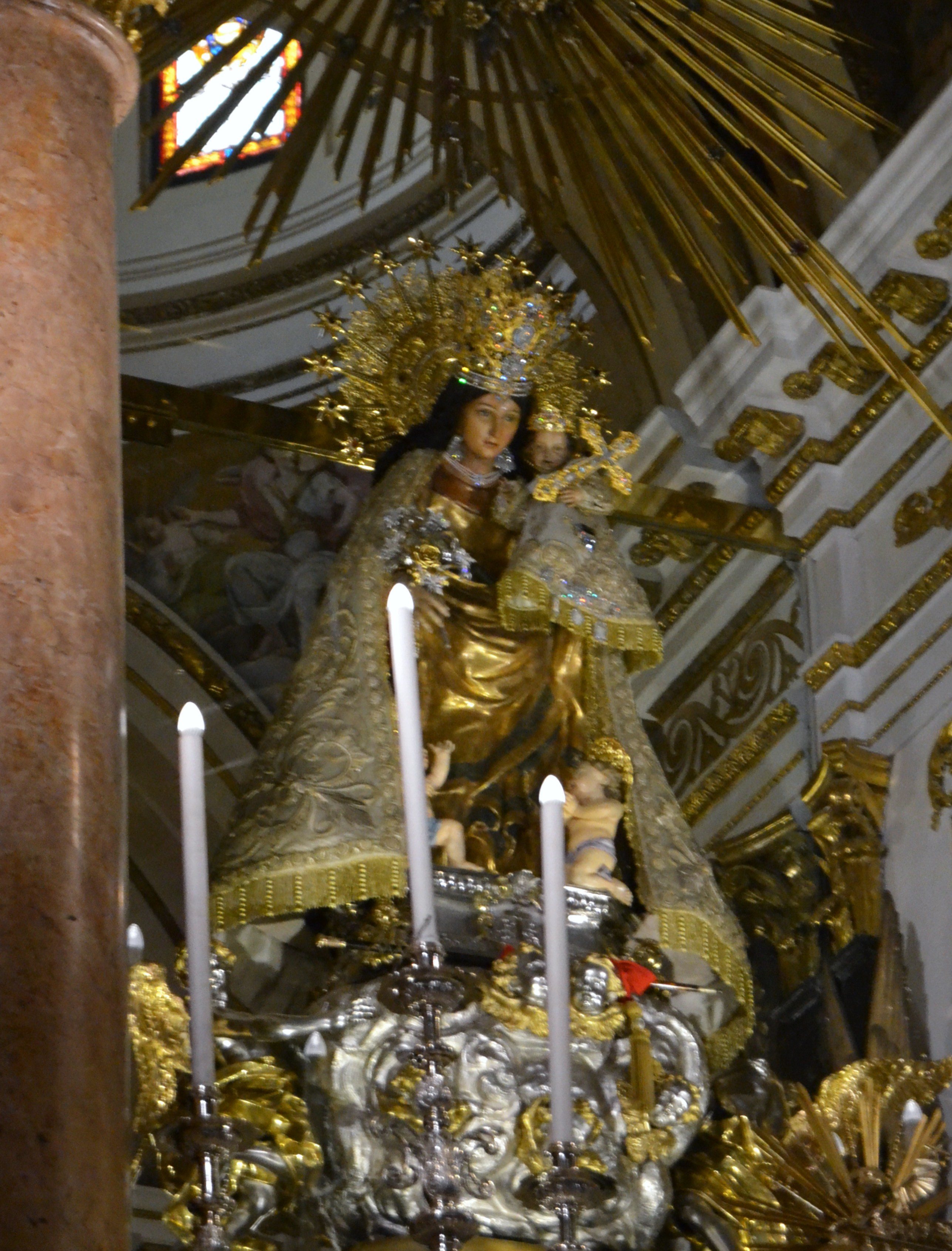 Estàtua de la mare de Déu dels Desemparats a la seua basílica de València.